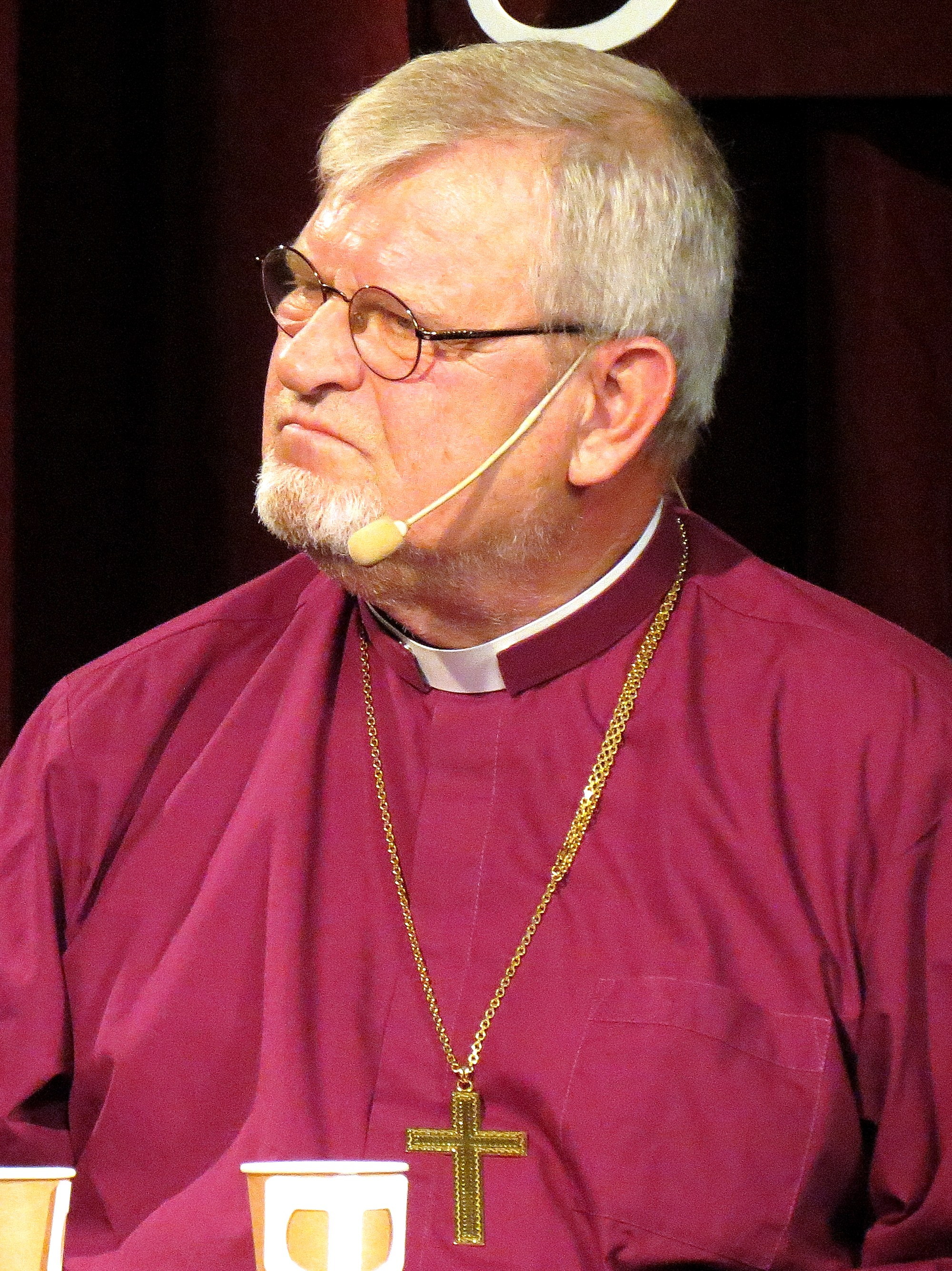 Martin Lind, biskop emeritus.